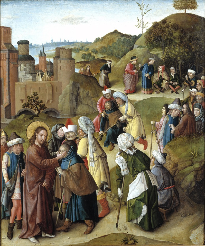 De genezing van de blinde te Jericho door de Meester van de Inzameling van het Manna, circa 1470.